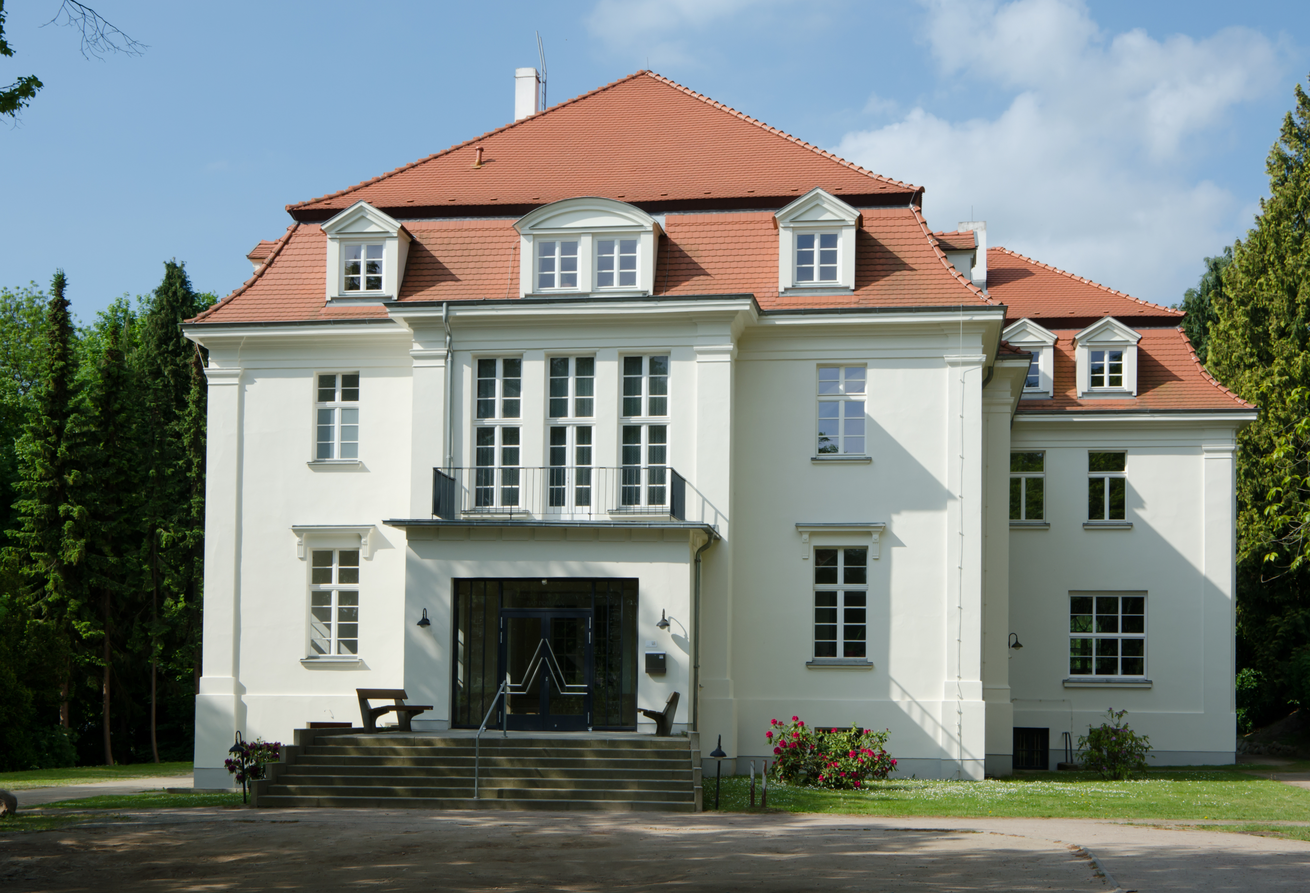 Denkmalgeschütztes Gebäude am Stülower Weg 2a , Bad Doberan